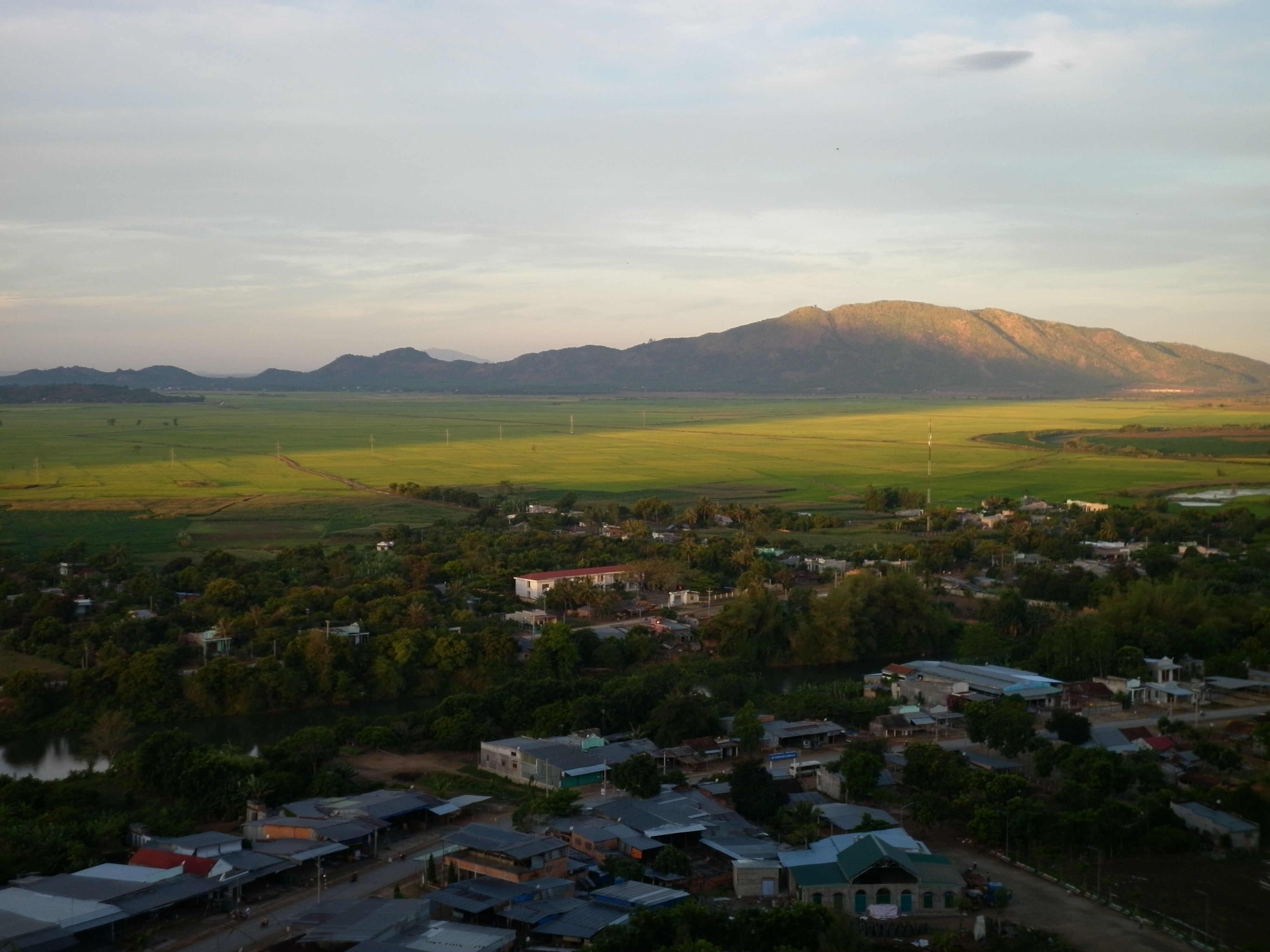 Bình minh Đức Mẹ Tà Pao